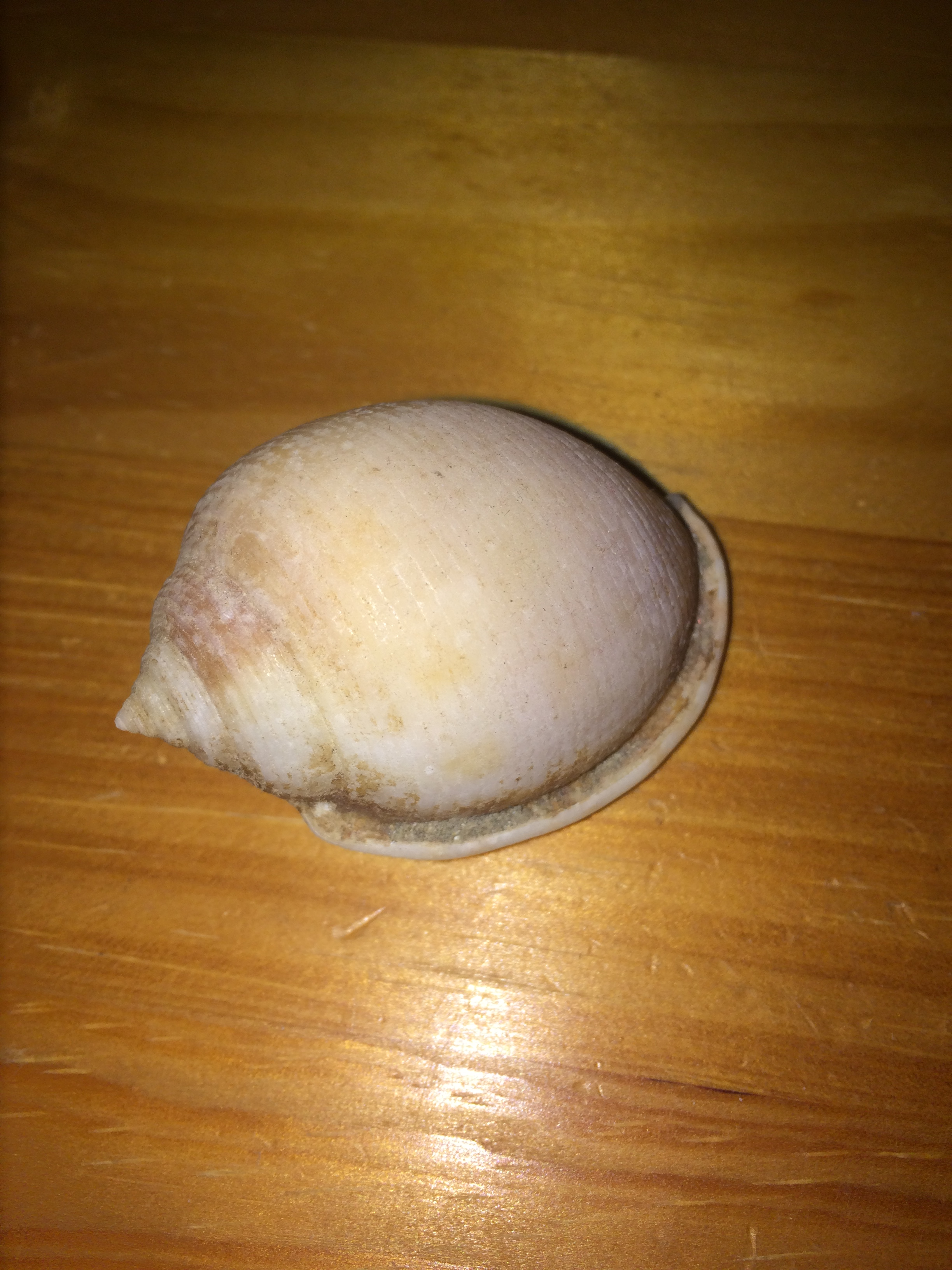 Oc bien tron